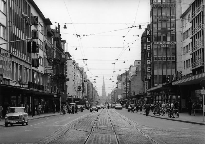 Juli 1966 Karlsruhe Kaiserstraße